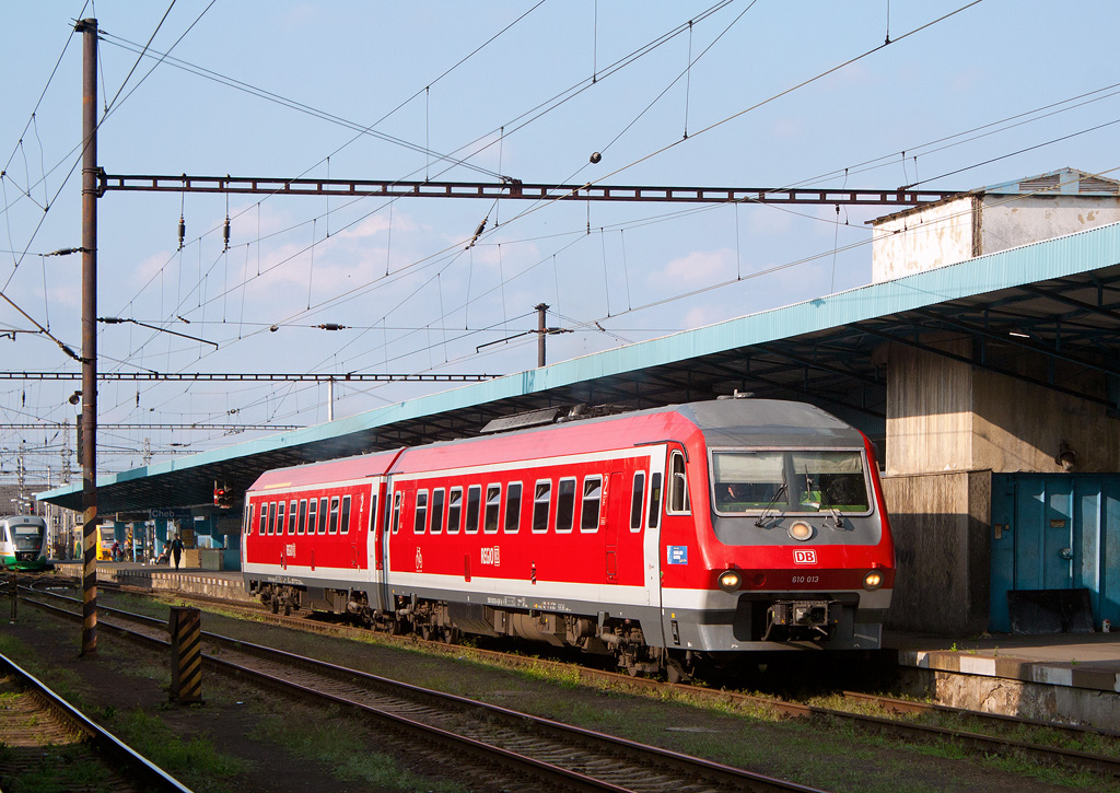 Jednotka 610 společnosti DB Regio na Sp 5290 z Chebu do Norimberka.